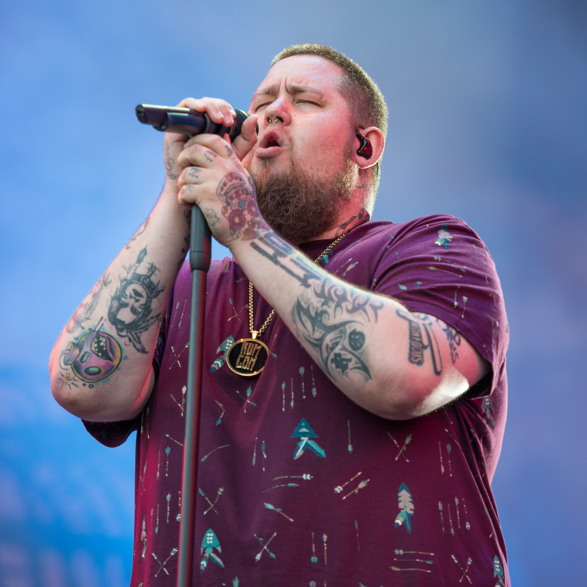 ARGO-Konzerte,Beck's Park Stage,Konzert,Livekonzert,Livemusik,Musik,Rag ’n’ Bone Man,RiP,Rock im Park 2017,Rory Graham